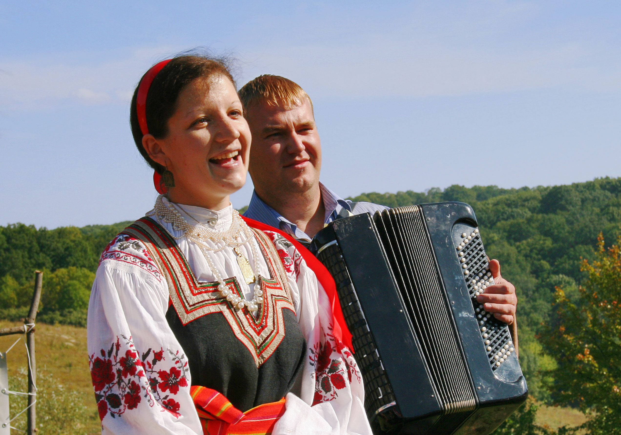 Праздник урожая в родовом экопоселении «Кореньские родники». 2010 г. (Сарафан конца XIX века Грайворонского района Белгородской области (Россия). Из фондов Белгородского государственного музея народной культуры)